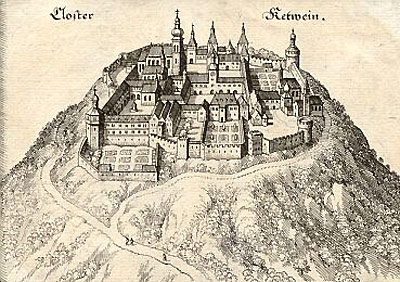 Stift Göttweig nach Matthäus Merian